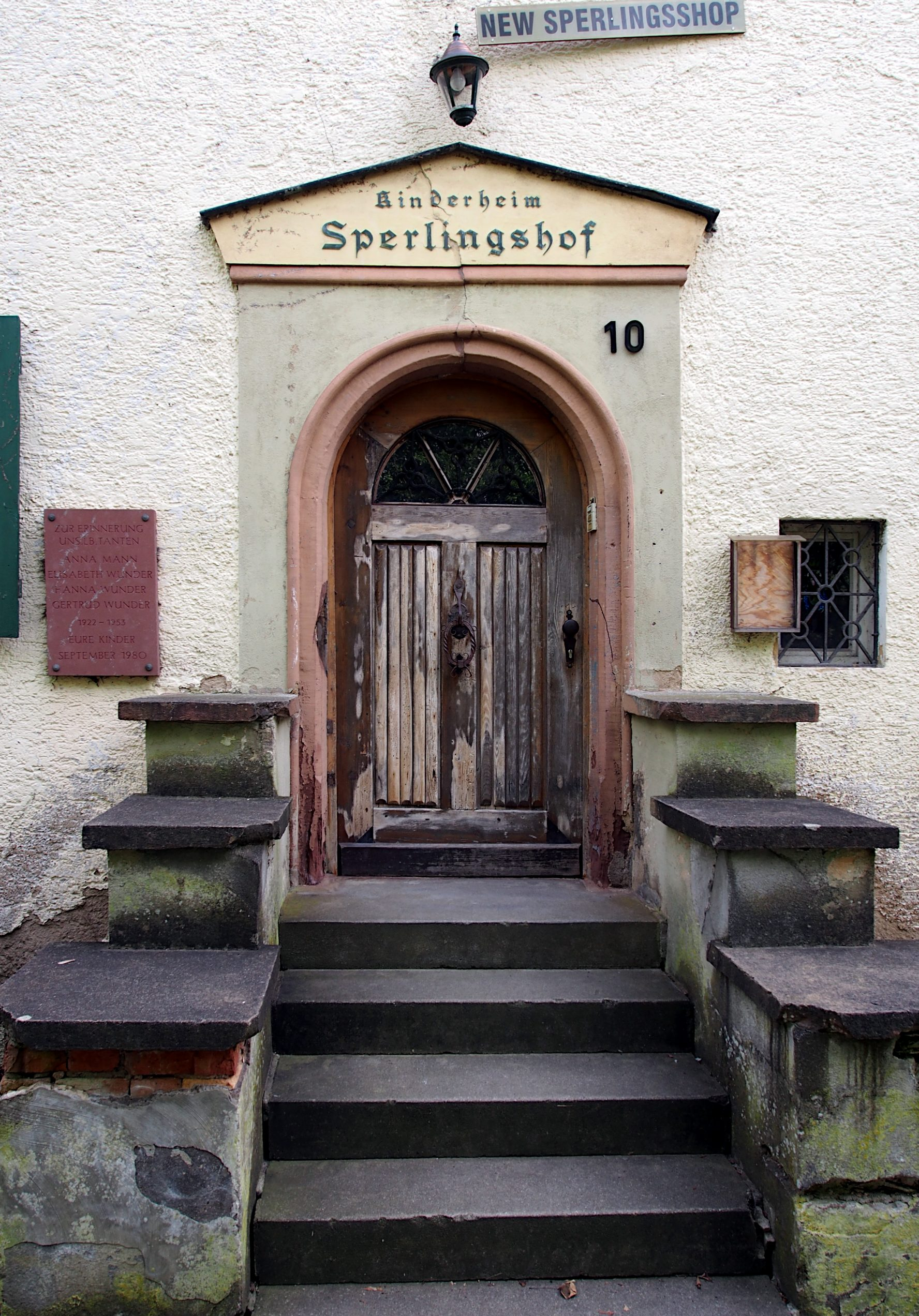 Kinderheim Sperlingshof, alte Türe